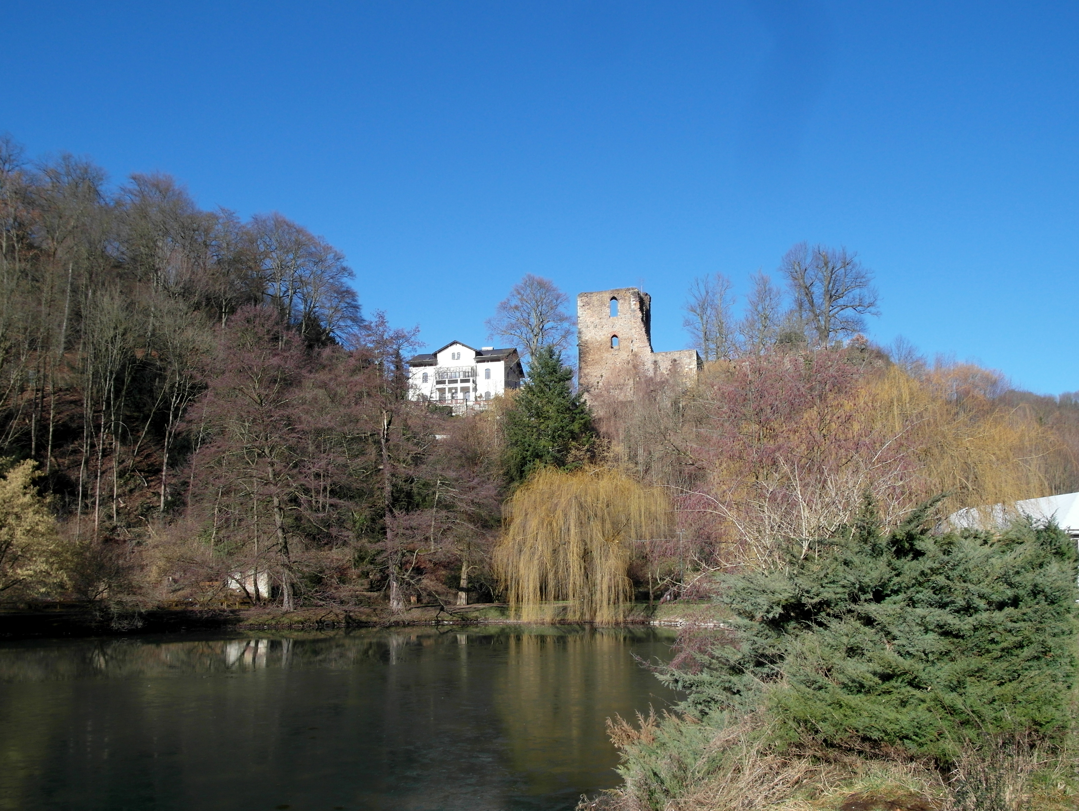 02.02.2018 01737 Tharandt: Burgruine aus dem 13. Jh., 1568 abgebrannt (GMP: 50.982664,13.581209). Links der Burg die 1851 für Julius Adolph Stöckhardt gebaute klassizistische Villa, Heinrich-Cotta-Str. 19 (GMP: 50.981540,13.582143). Sicht von Süden. [SAM3708.JPG]20180202230DR.JPG(c)Blobelt